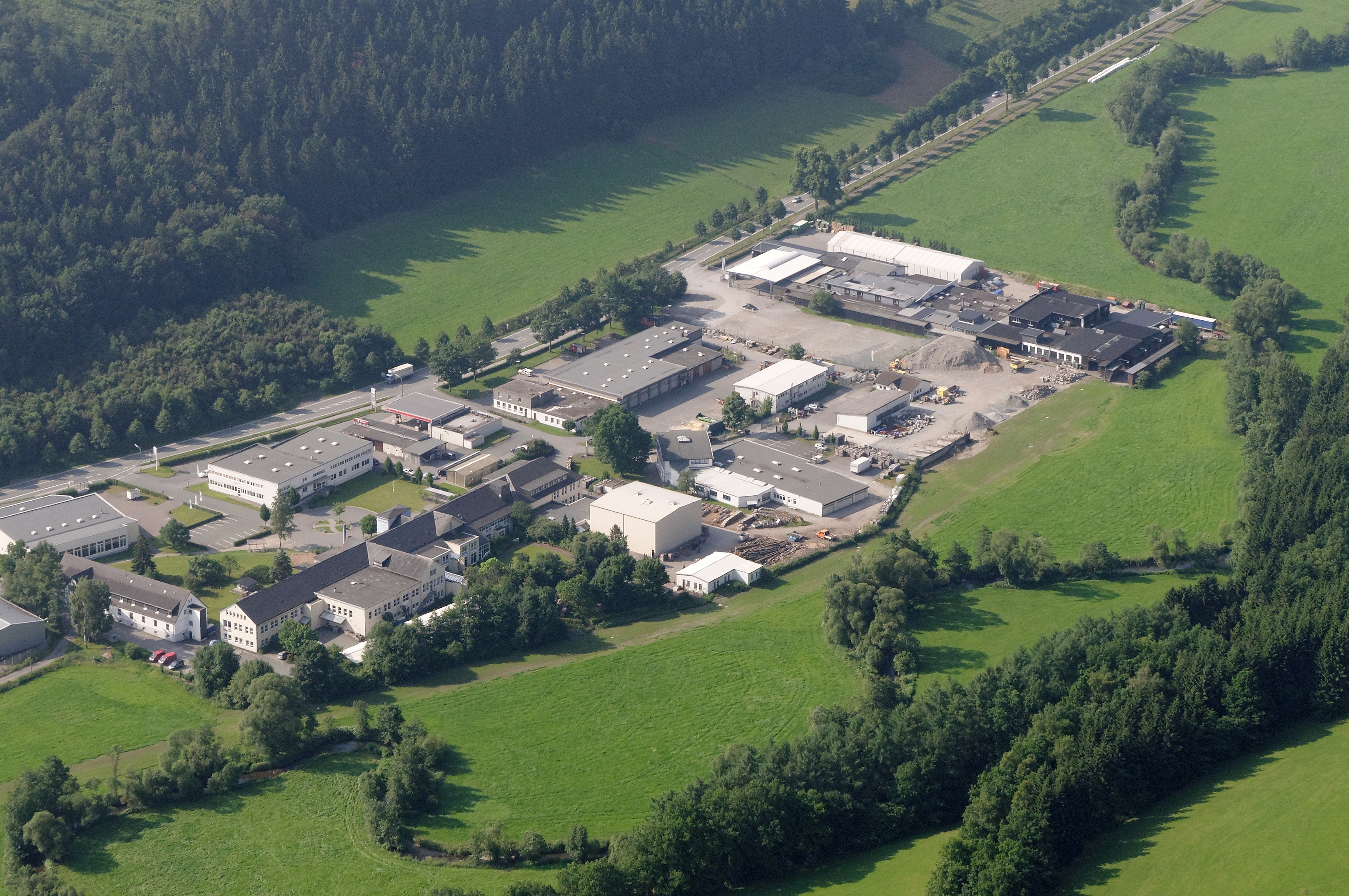 Fotoflug Sauerland-Ost: Schmallenberg, Gewerbegebiet Breite Wiese, Fleckenberger Straße (B 236), Blick Richtung Süden. The making of this document was supported by the Community-Budget of Wikimedia Germany.